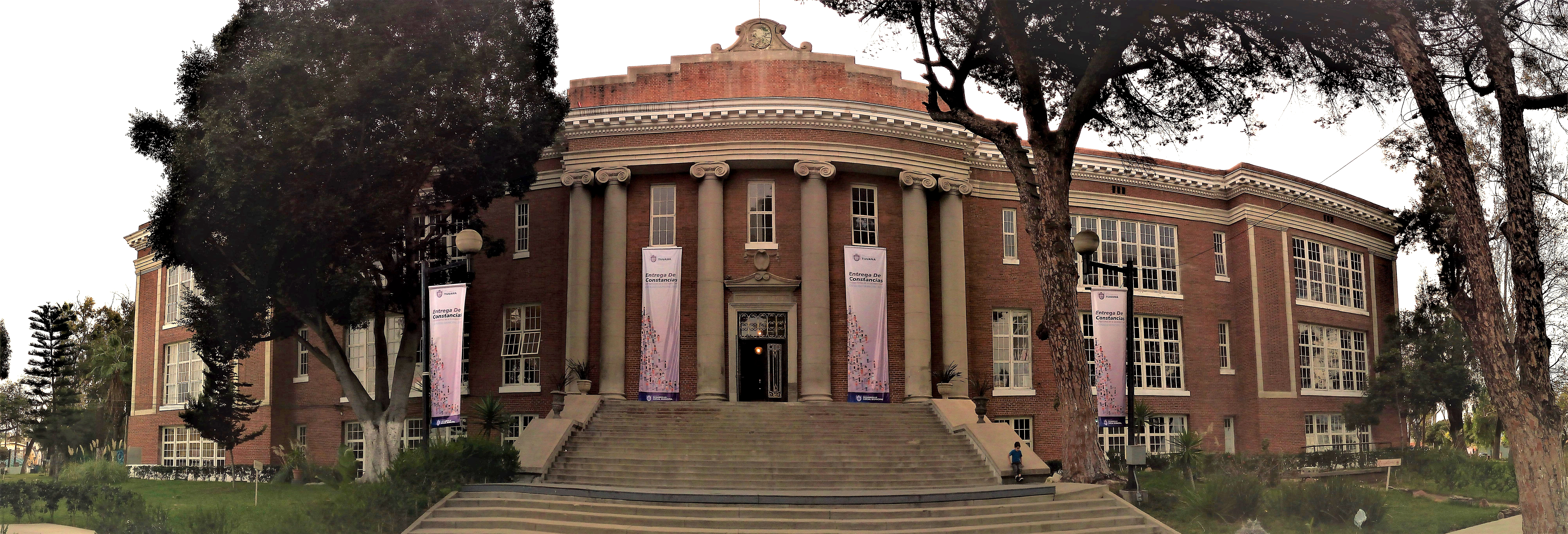 Panorama de la Casa de la Cultura en la Col. Altamira.